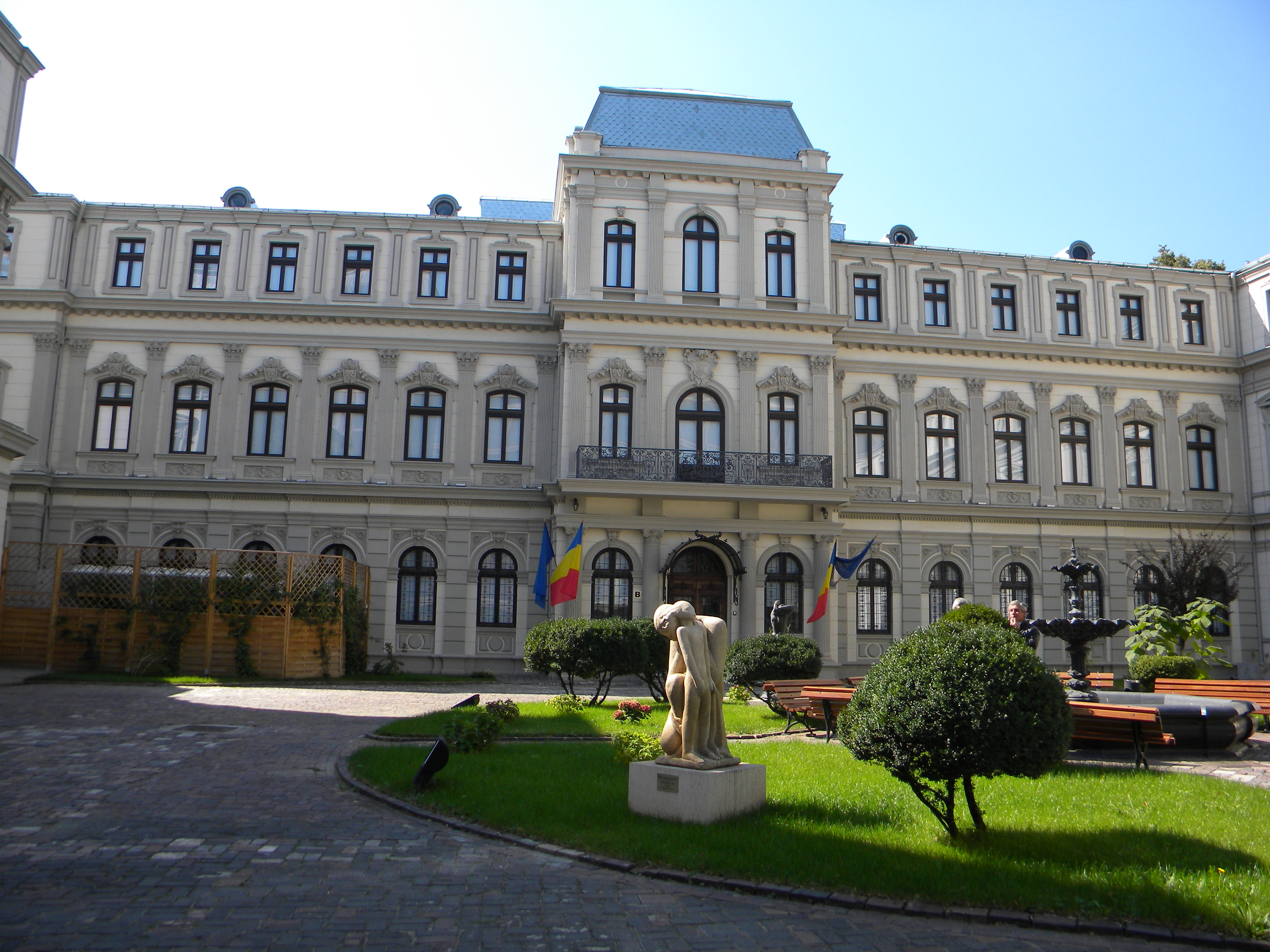 Bucuresti, Romania, Muzeul Colectiilor, Calea Victoriei nr. 111-113, sect. 1 (fatada)